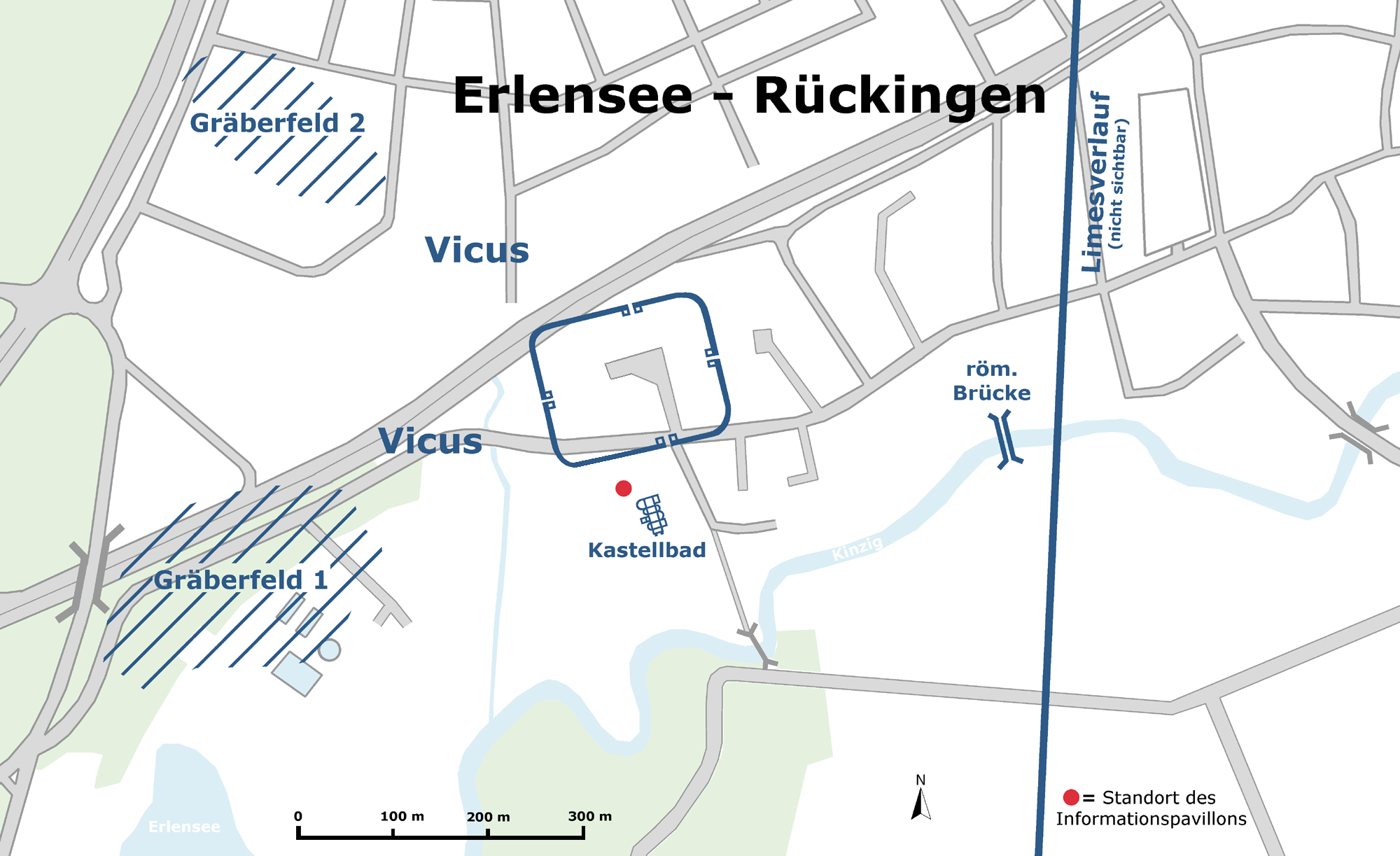 Kastell Erlensee-Rückingen (ORL B II,2 Nr. 22), Übersichtsplan.